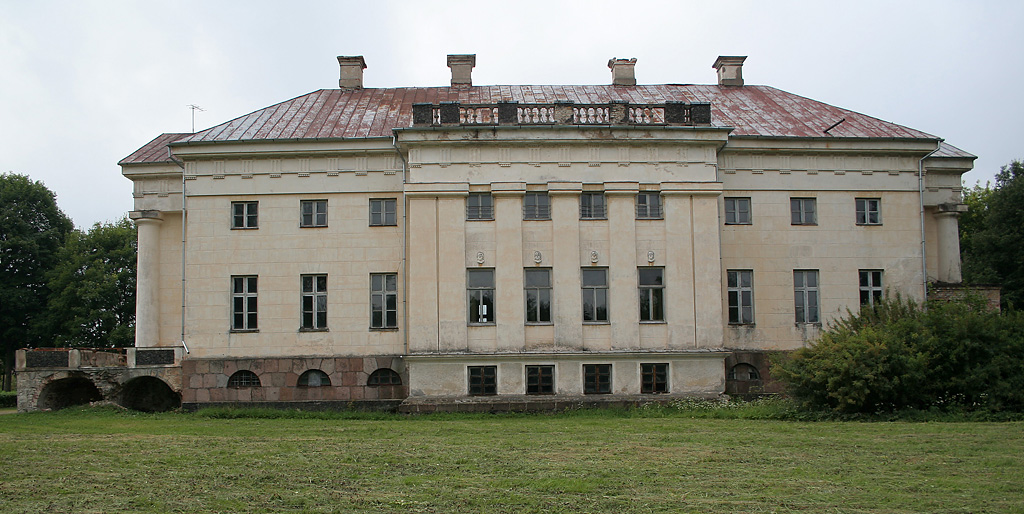 Pakruojo dvaras, Pakruojo rajonas